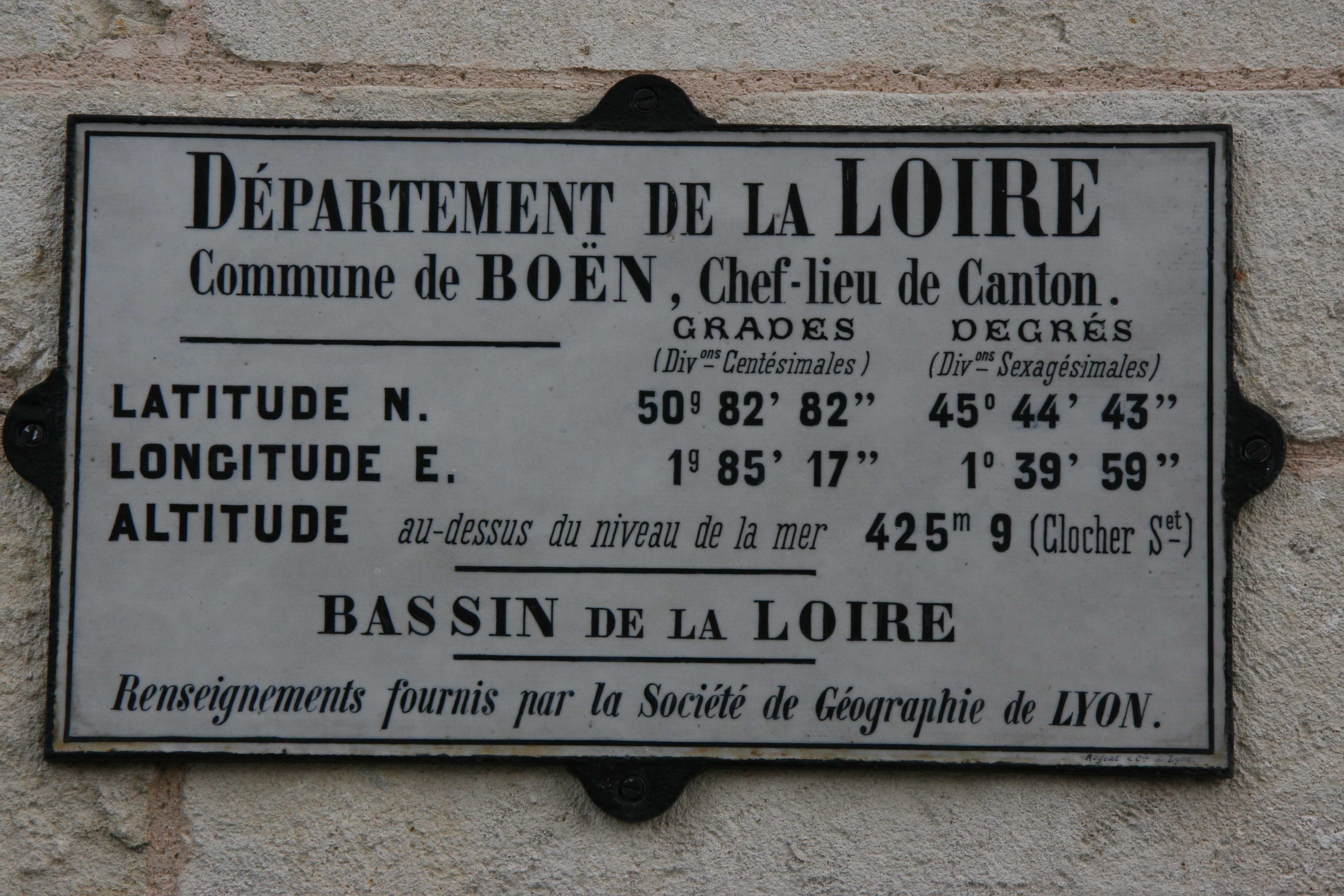 plaque signalétique, commune de Boën (ou Boën-sur-Lignon), située dans le département de La Loire, France.